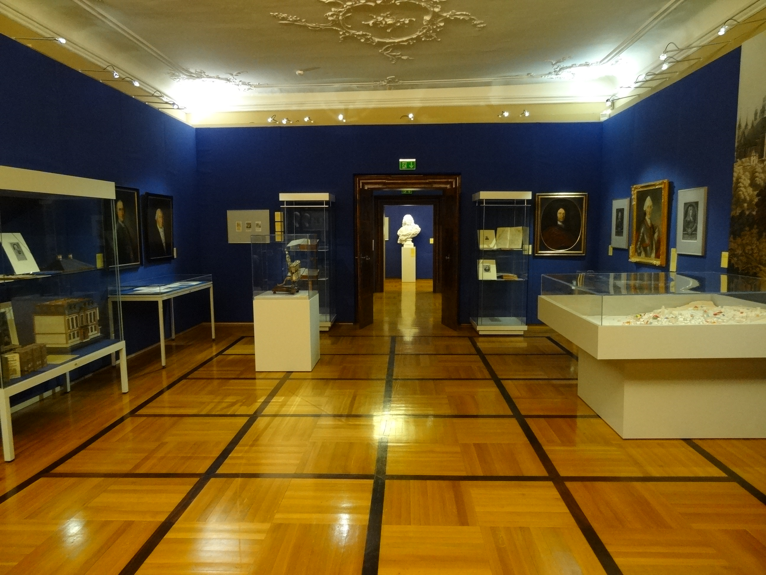 Reichskammergerichtsmuseum